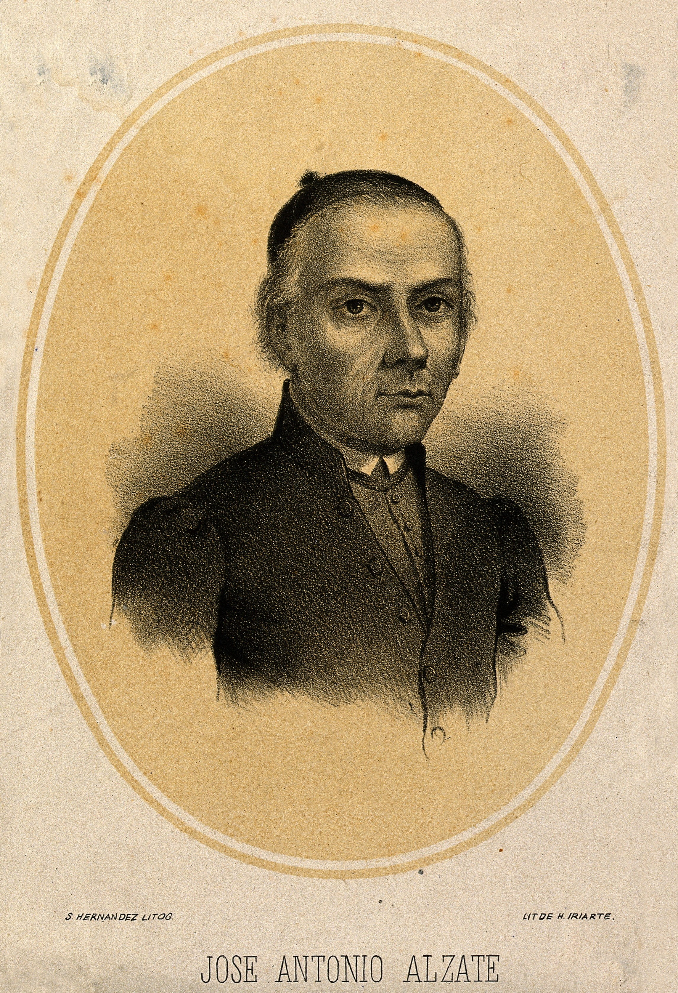 Genre/Technique: Portrait prints. Lithographs. Subject name: Alzate y Ramírez, José Antonio de, 1737-1799.